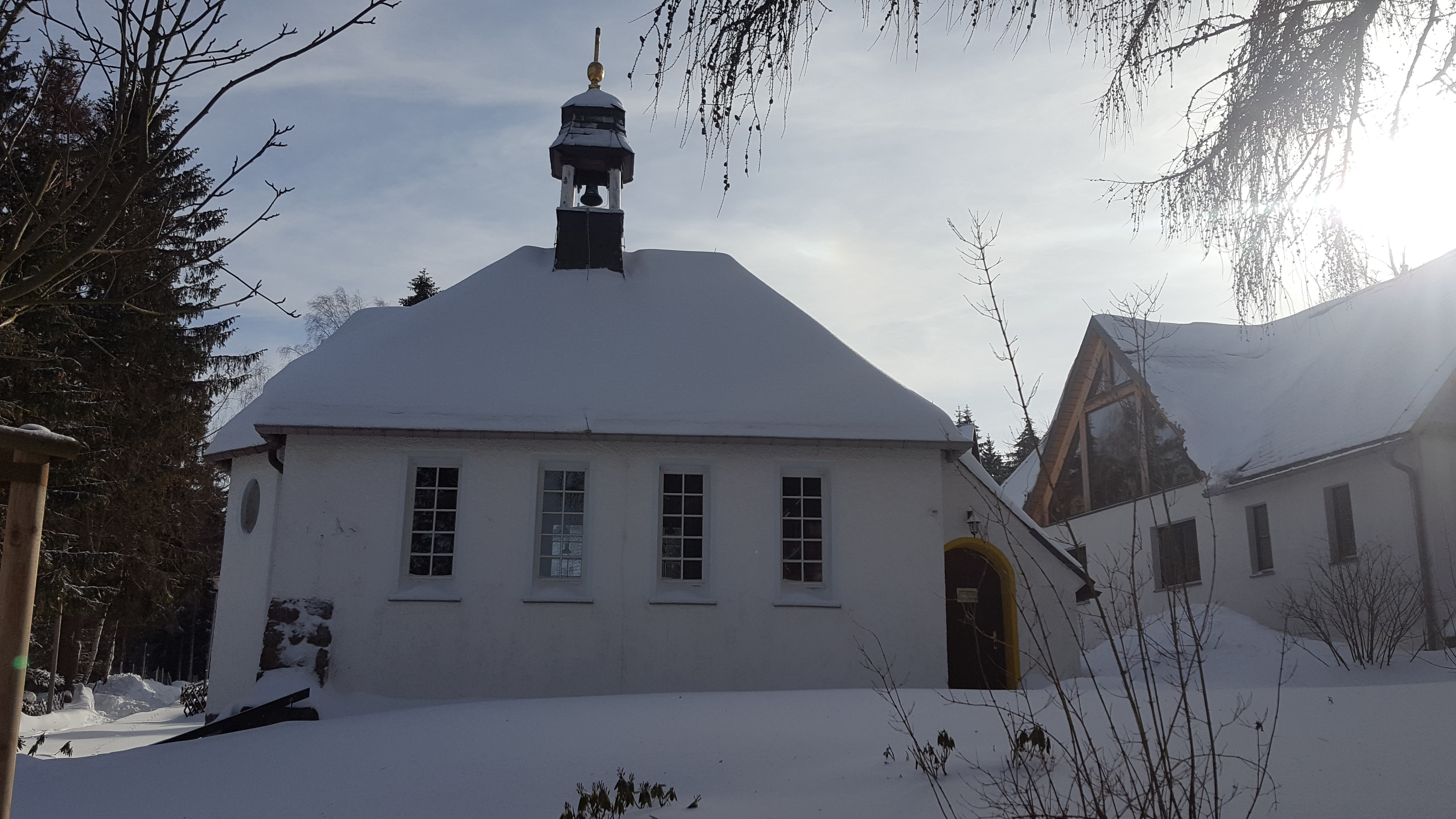 Oberbärenburg; Katholische Waldkapelle im Winter